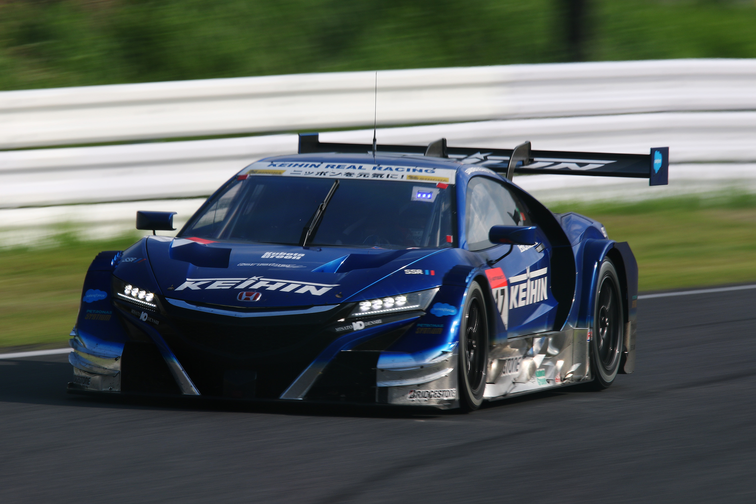 2017.8.27 SUPER GT Rd.6 Suzuka 1000km KEIHIN REAL RACING 17 KEIHIN NSX-GT [7D2_2798ks]